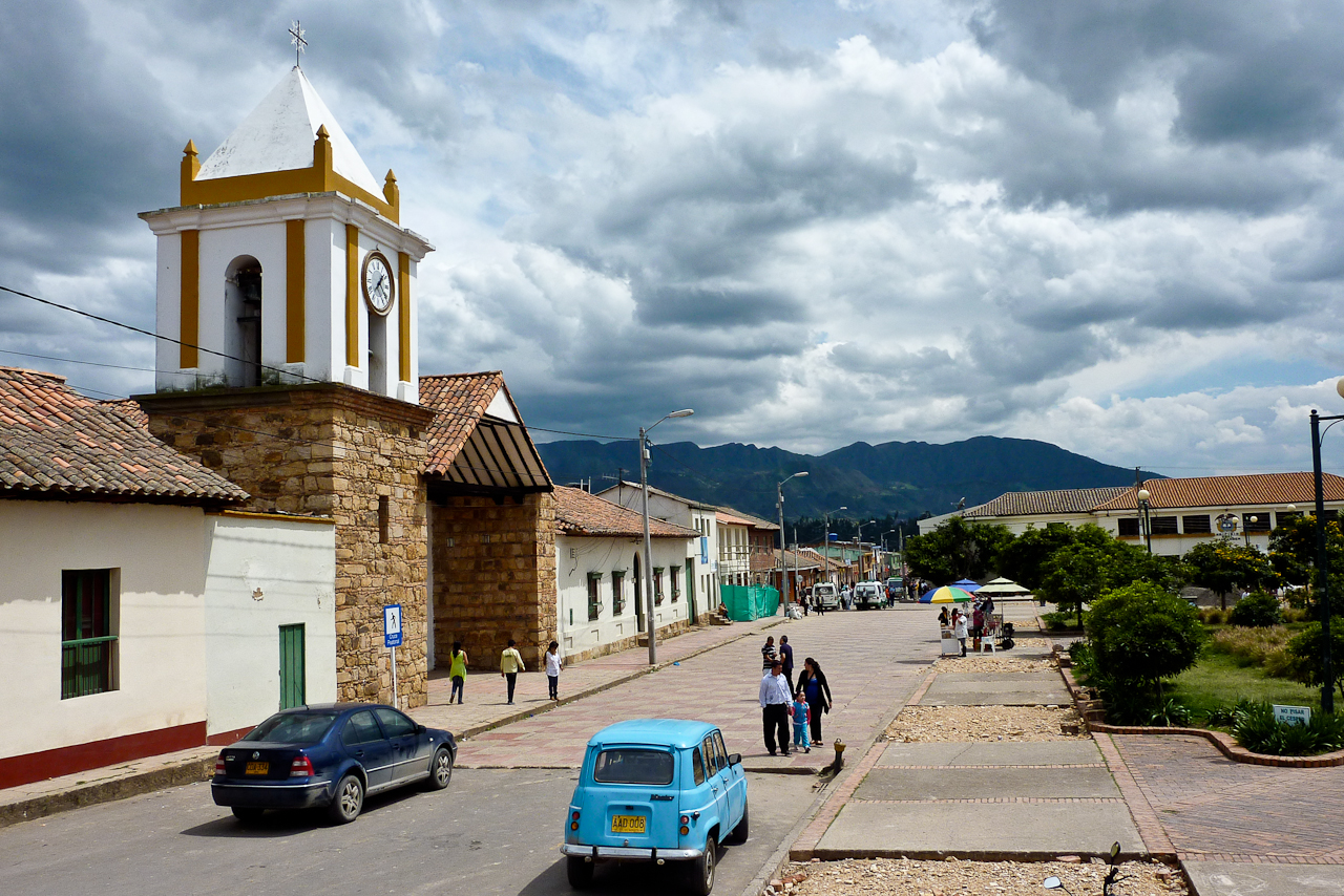 Parque Principal de Suesca